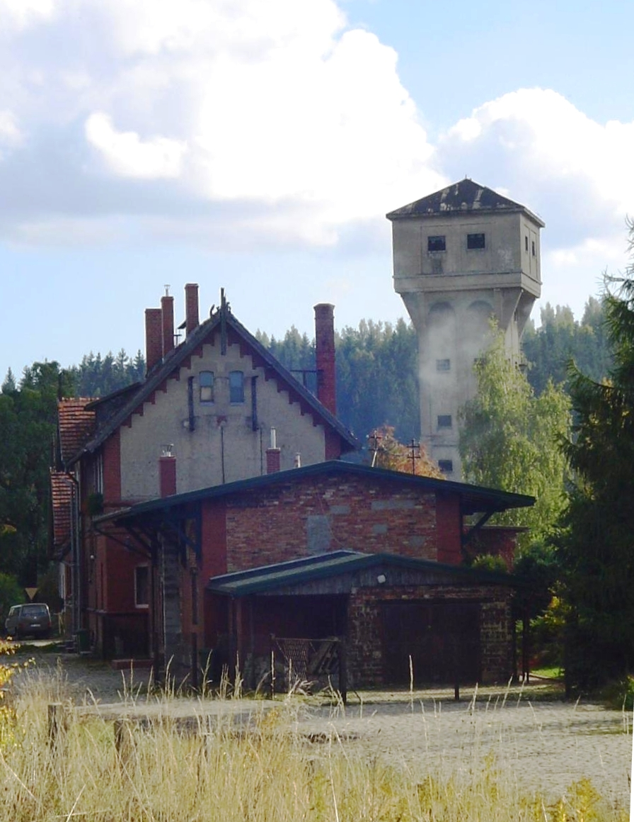 Wałbrzych, ul. Kopalniana 2 - zespół szybu „Tytus”, pocz. XX w.: - wieża nadszybowa, - łaźnia, - lampiarnia, - markowniaZabytek nr 818/WŁ z 25.08.1981